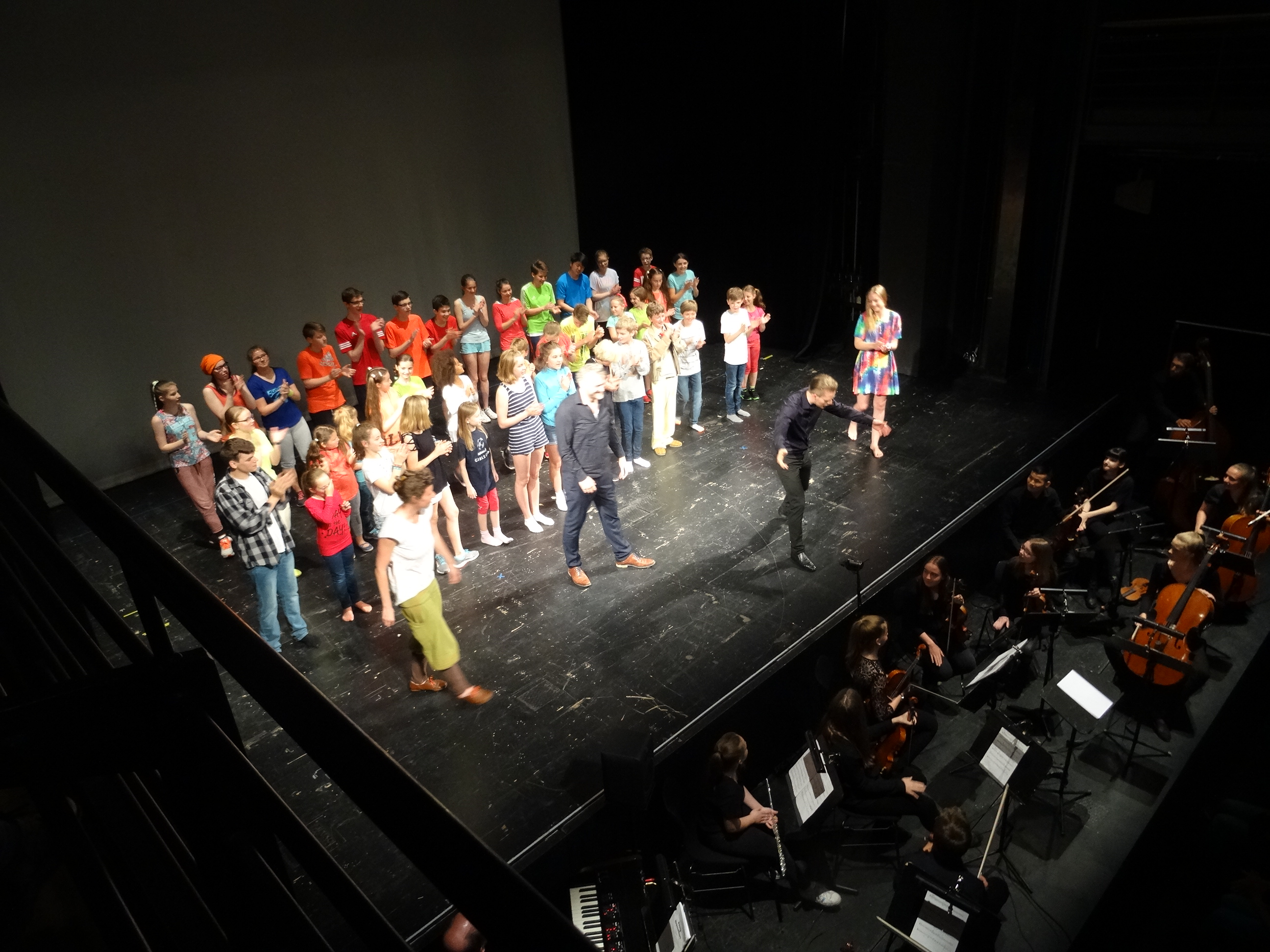 Jugendsinfonieorchester mit Jugendchor Belcanto und Spielkreis des Staatstheaters Braunschweig nach Aufführung von "König Drosselbart"